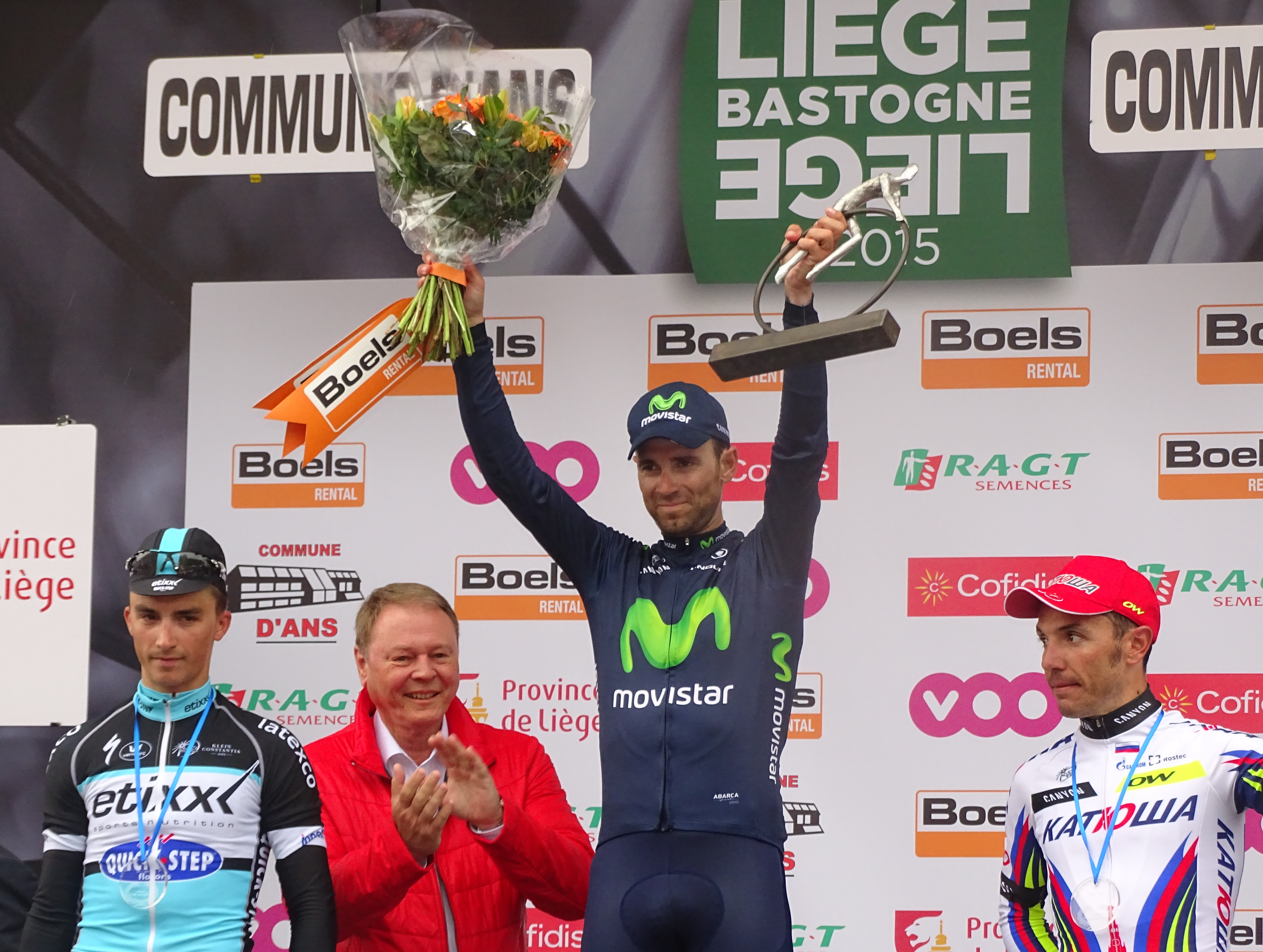 Reportage réalisé le dimanche 26 avril à l'occasion de l'arrivée de Liège-Bastogne-Liège 2015 à Ans, Belgique.